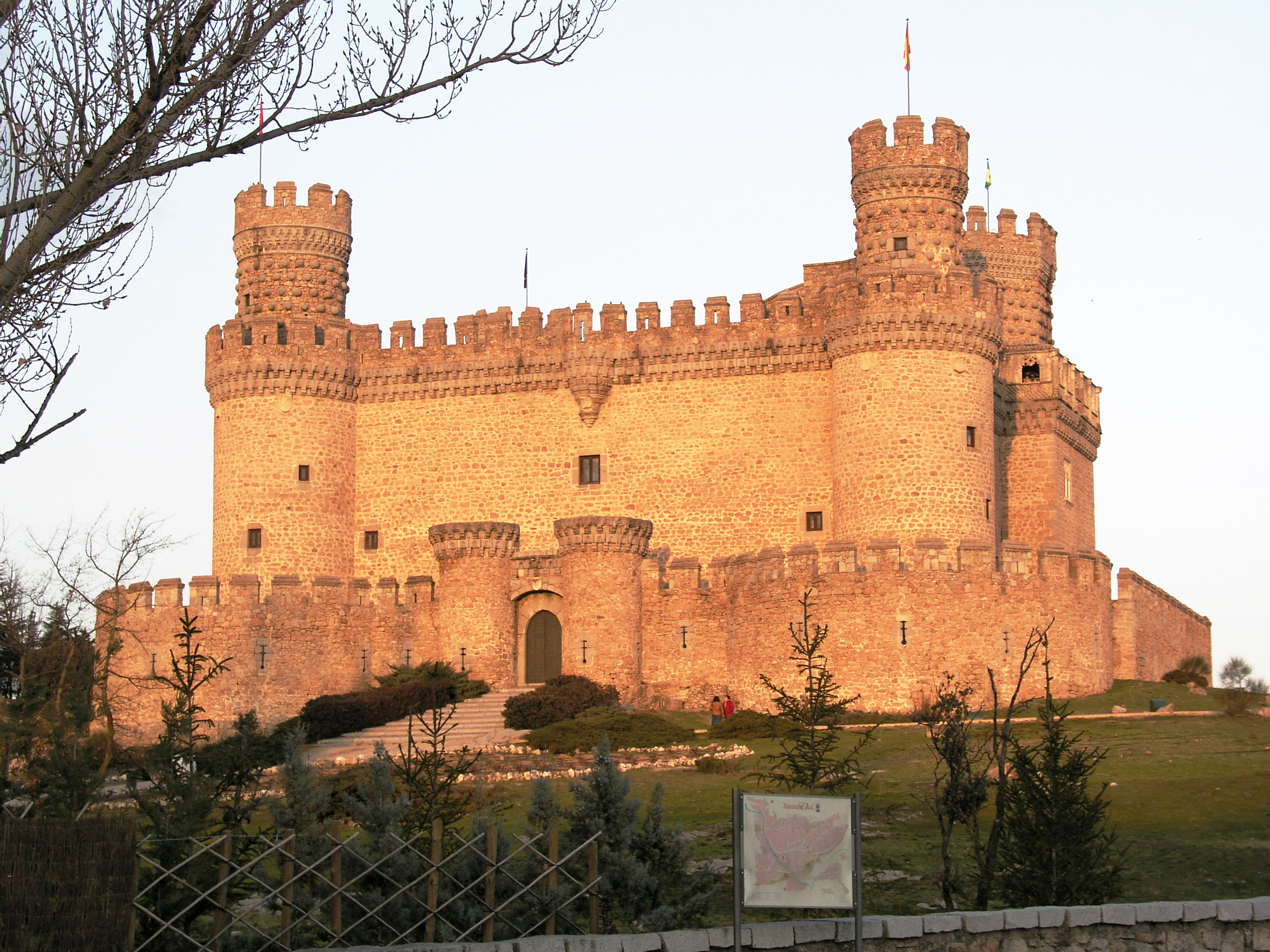 Manzanares El Real, Castillo. Spain.